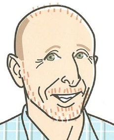 רישום פורטרט של מיקי קאופמן